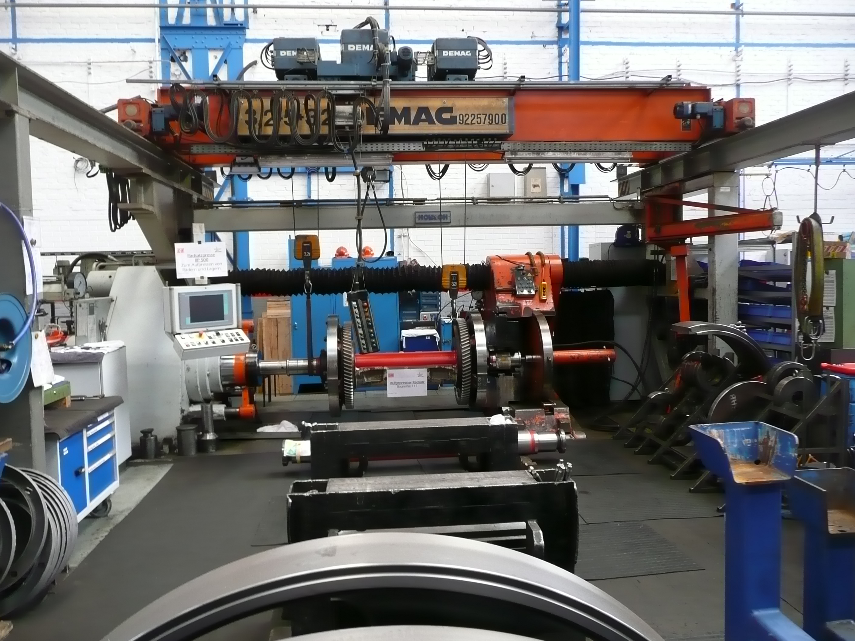 Radsatzpresse RP 500 in der Radsatzwerkstatt des AW Dessau